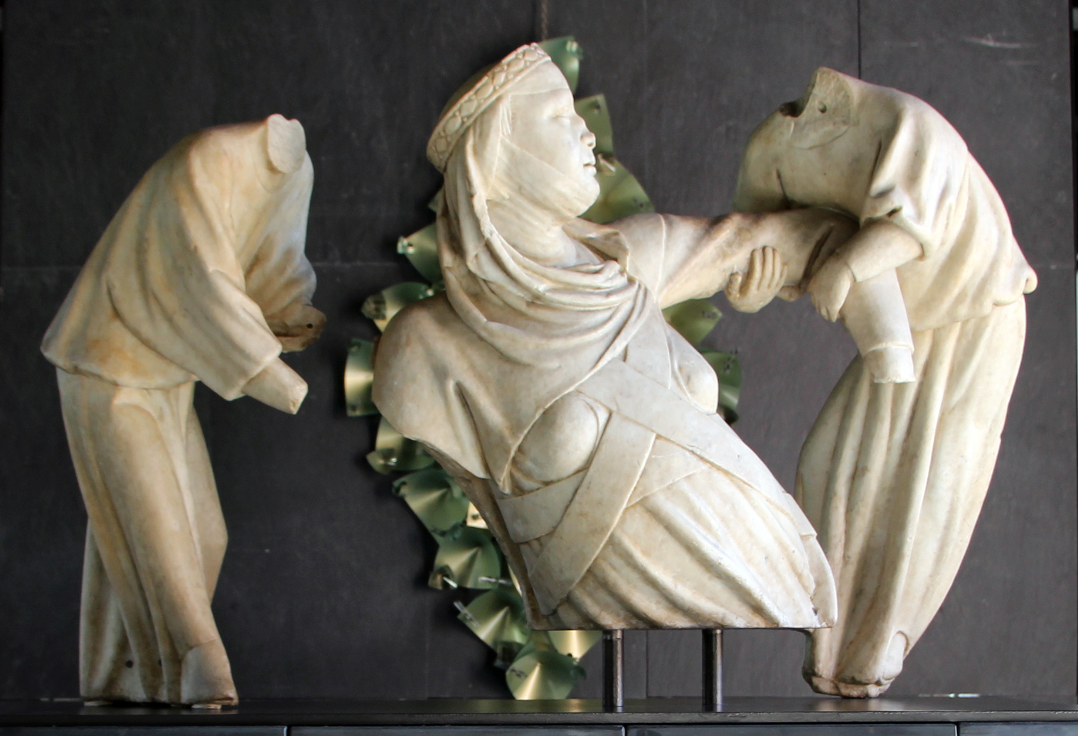 Chiostri e museo di Sant'Agostino The making of this document was supported by Wikimedia CH. (Submit your project!) For all the files concerned, please see the category Supported by Wikimedia CH. This is a photo of a monument which is part of cultural heritage of Italy.